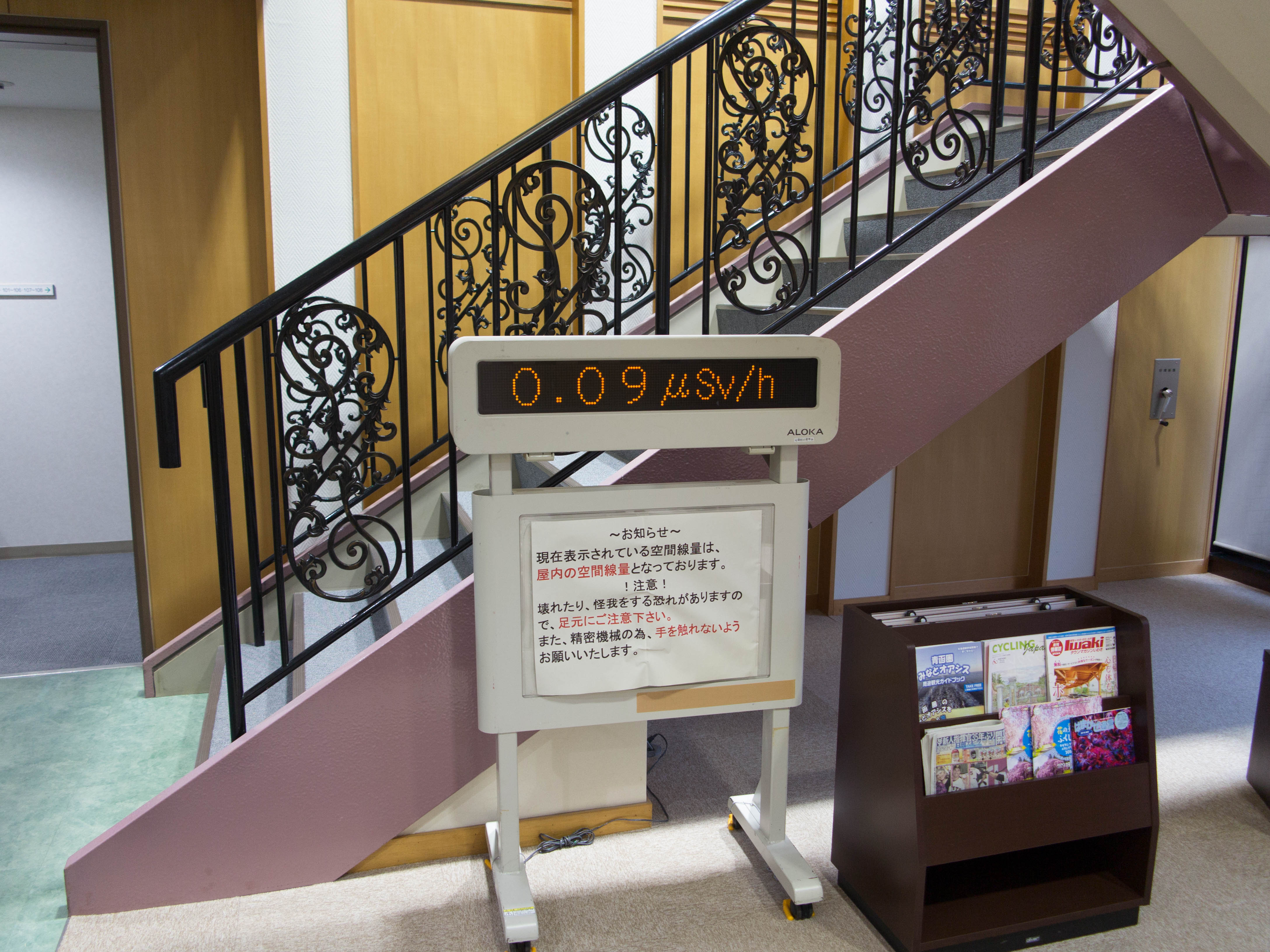 展望の宿 天神